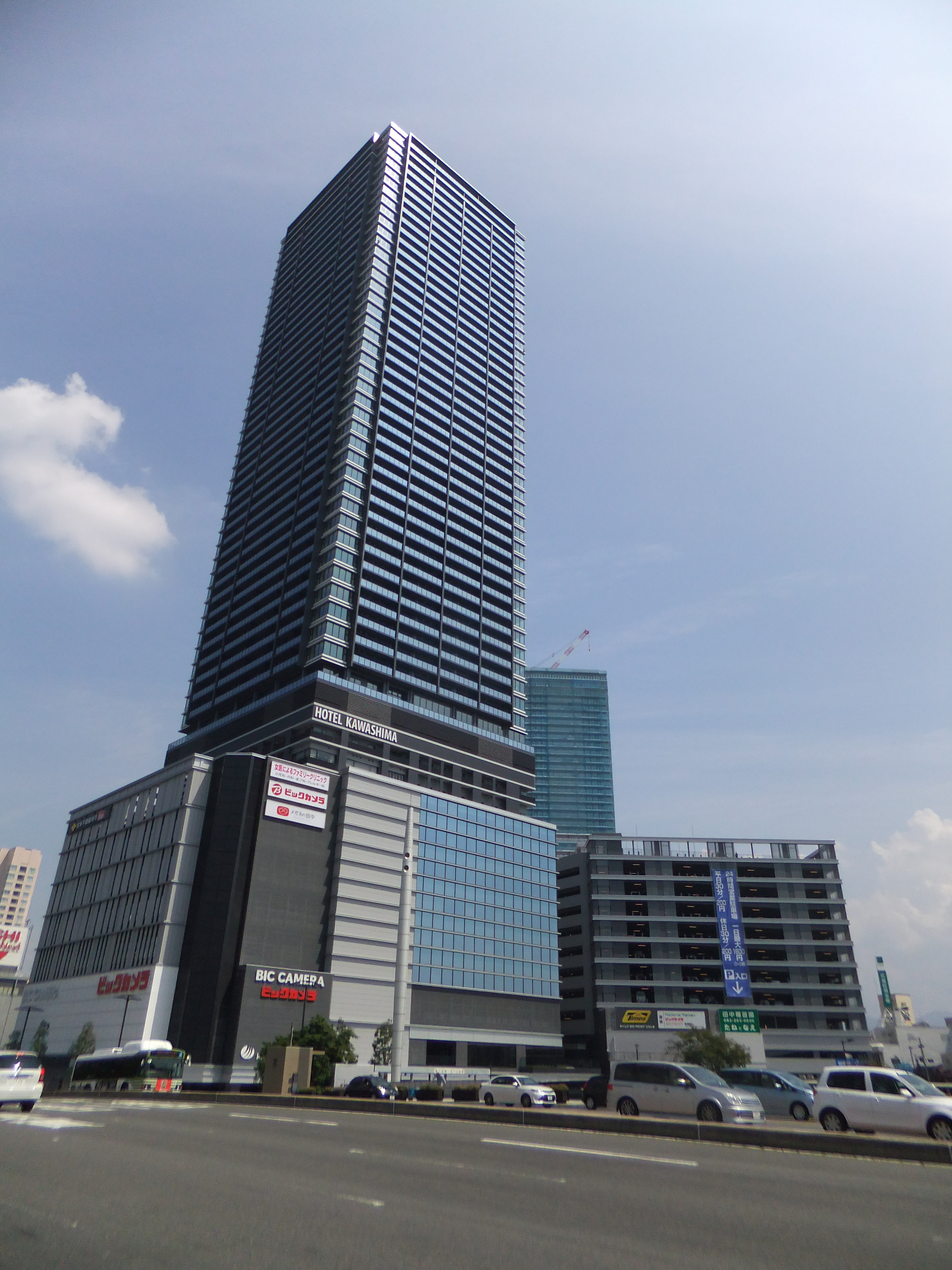 BIG FLONT ひろしま